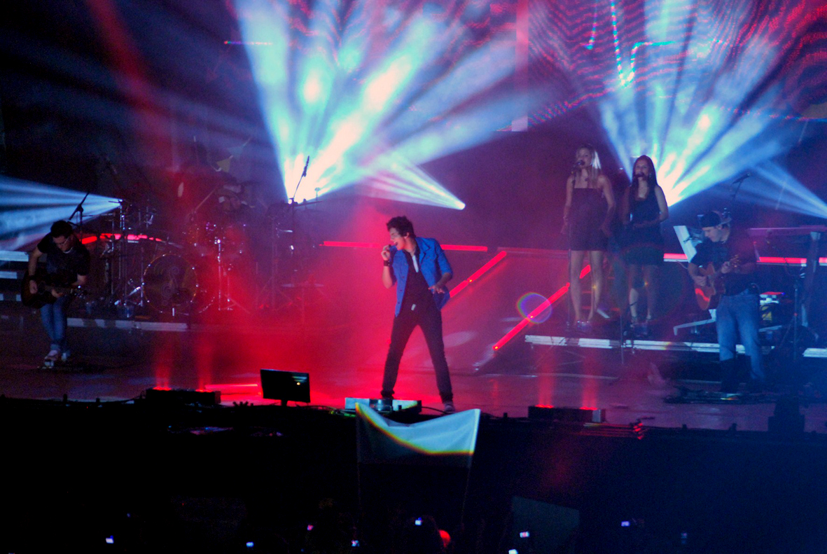 Luan Santana se apresentando no show de verão no Hotel Jequitimar.